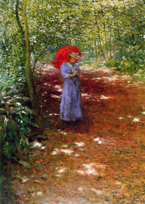 Antonín Slavíček - Ve Veltruském Parku (66x55cm, 1896, olej na kartonu, Národní galerie v Praze)